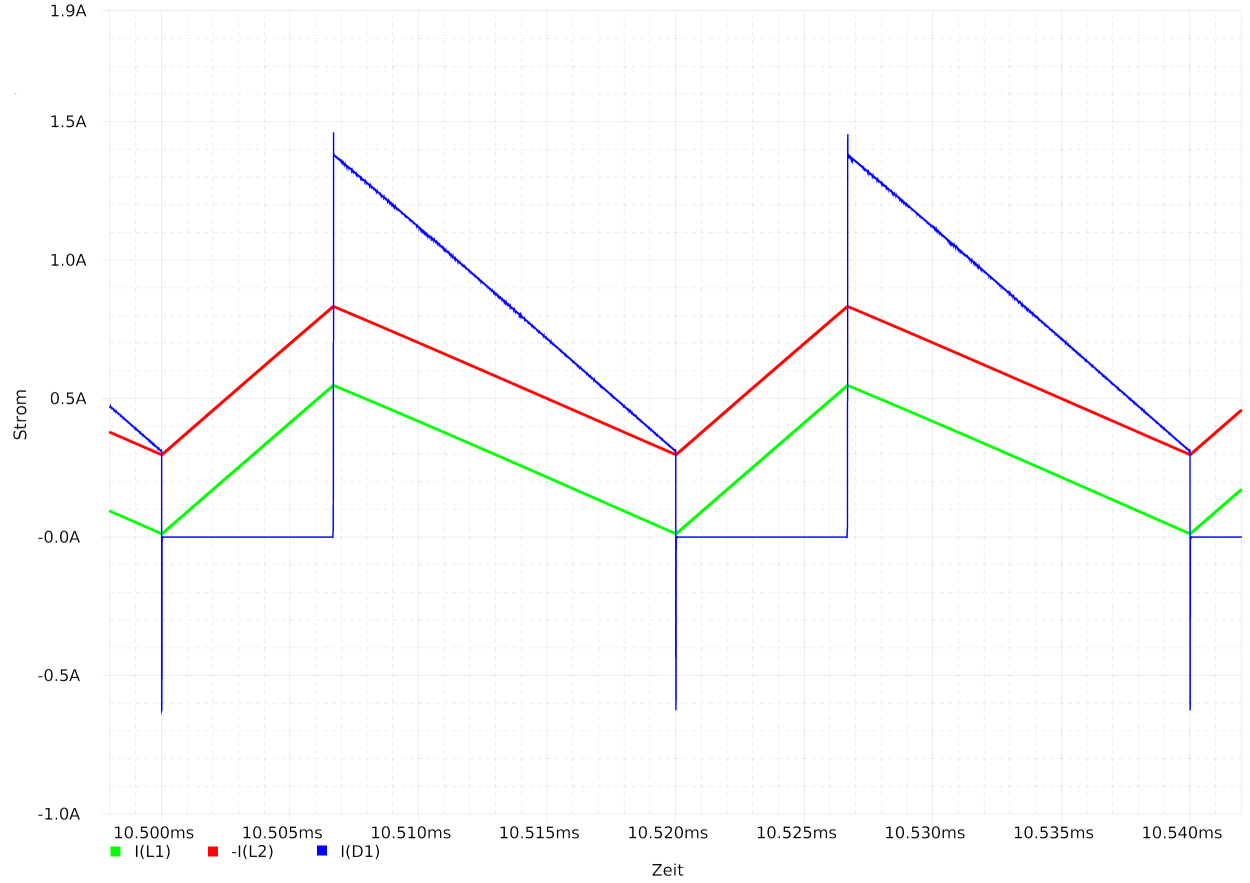 Zeitverlauf der Stroeme im ccm-Modus